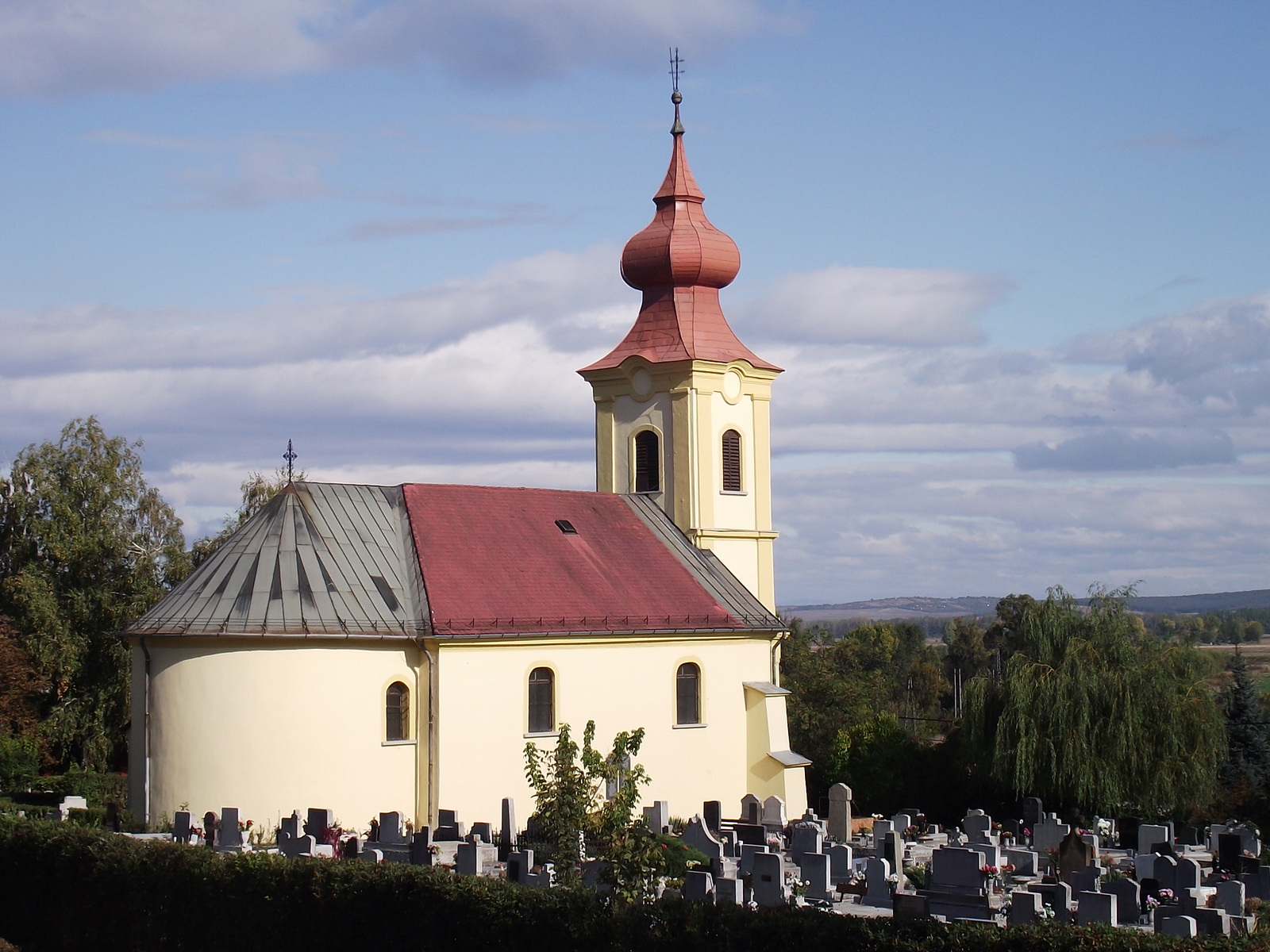 R. k. templom (Sajószentpéter, Kossuth u. 22.) This is a photo of a monument in Hungary, Identifier: 3078